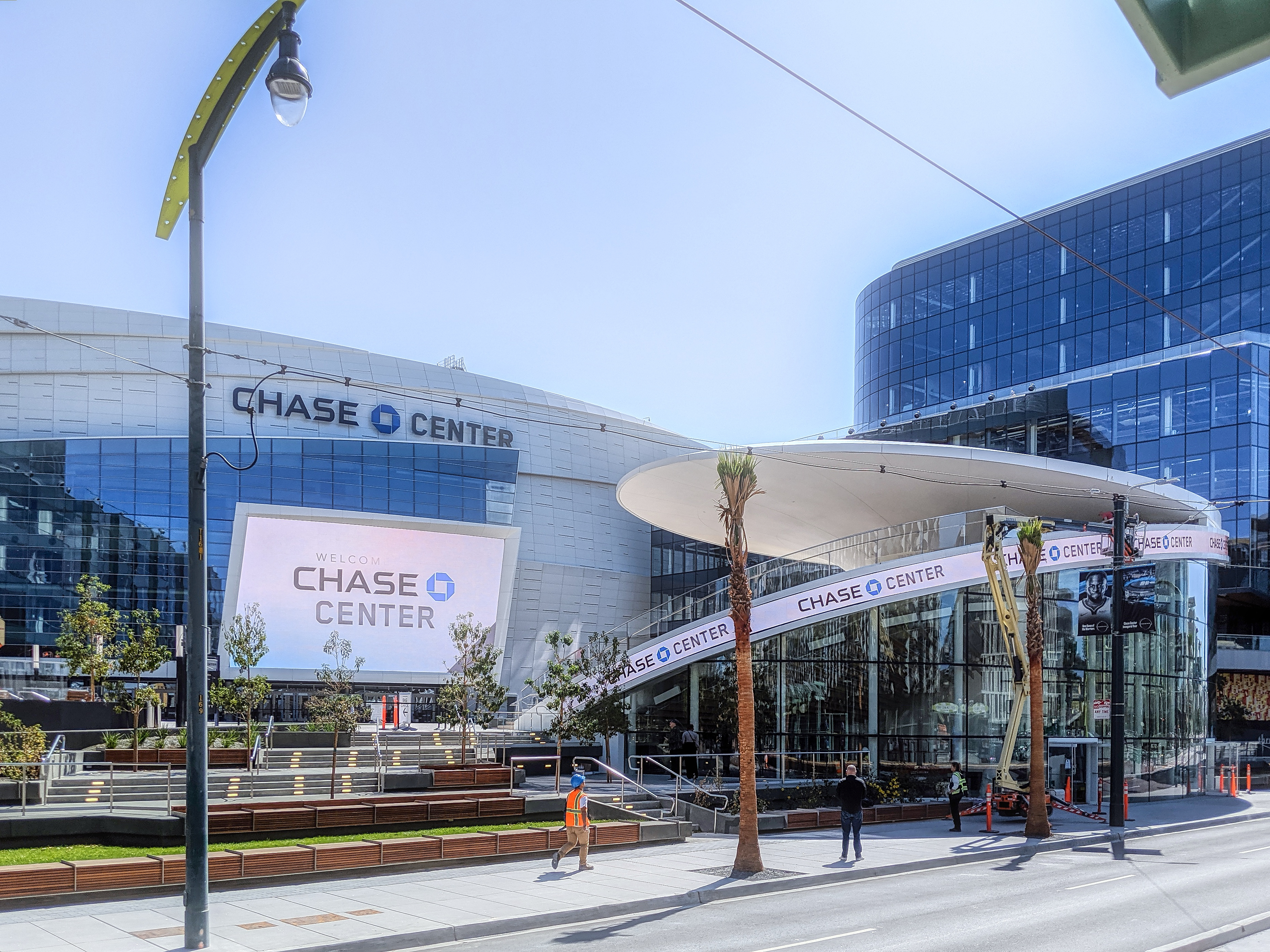 San Francisco